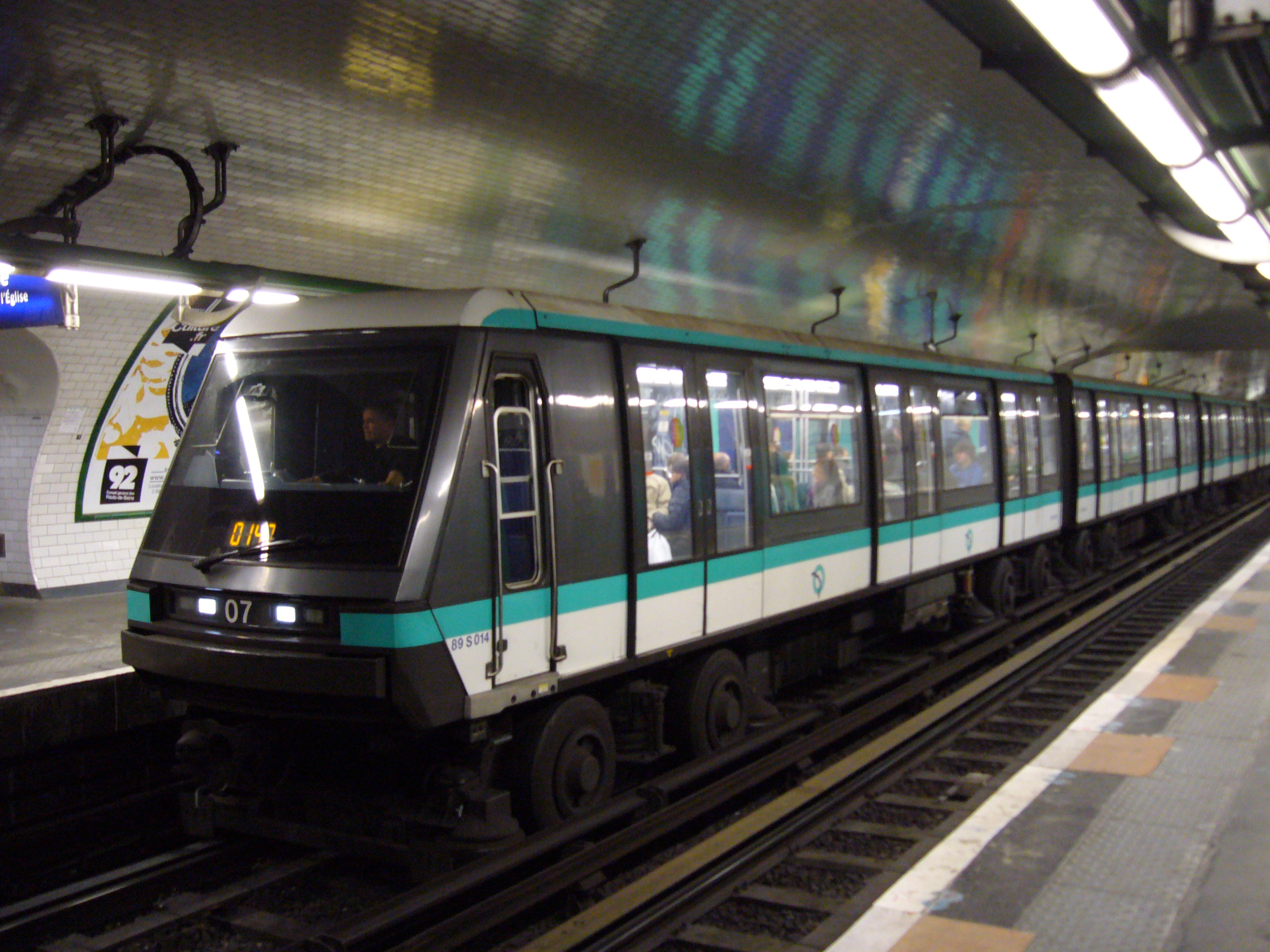 Un MP 89 à quai à la station Pont de Neuilly sur la ligne 1 du métro de Paris.